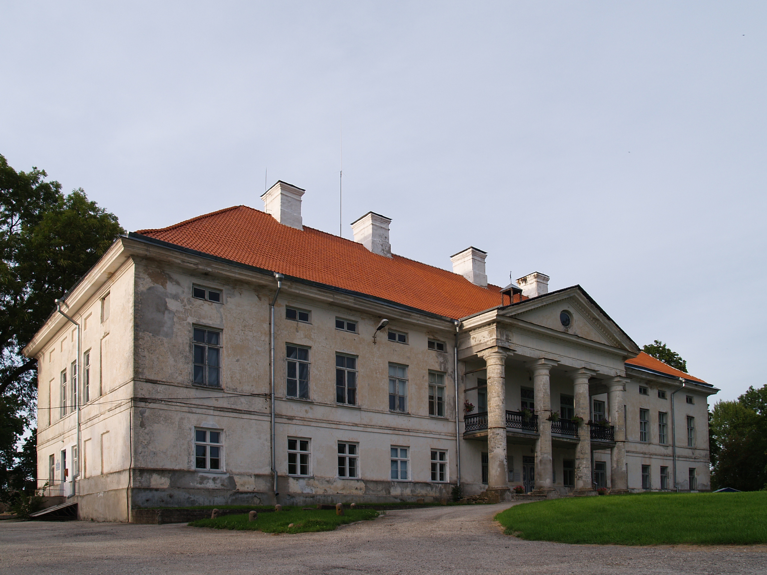 Lihula mõisa peahoone